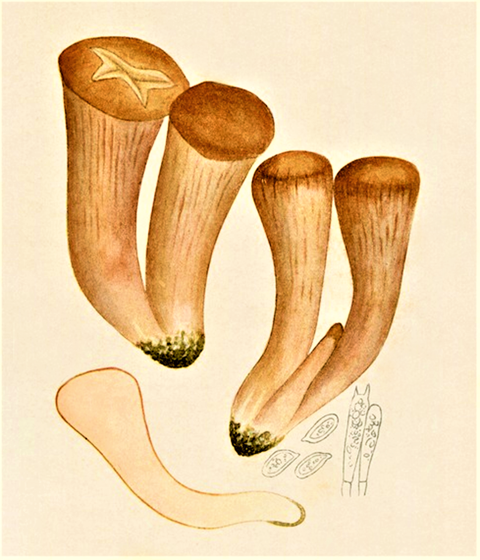 Giacomo Bresadola: Clavaria pistillaris (L. (1753), heute Clavariadelphus pistillaris (L.) Donk (1933), ist aber eindeutig Clavariadelphus truncatus (Quél., 1886) Donk (1933)